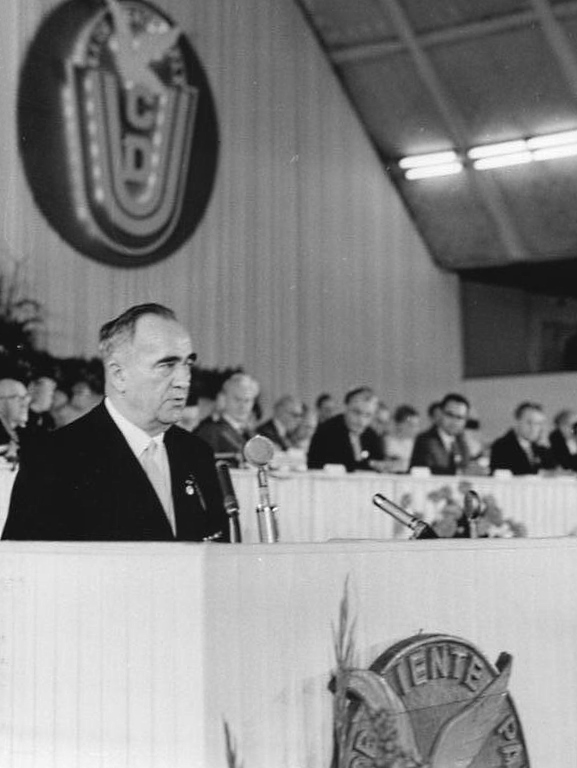 Zentralbild 30.9.1964 11. Parteitag der CDU in Erfurt eröffnet. In der festlich geschmückten Erfurter Thüringenhalle wurde am Vormittag des 30.9.1964 der 11. Parteitag der Christlich-demokratischen Union eröffnet. UBz: Der Vorsitzende der CDU, August Bach, bei seinem Referat.